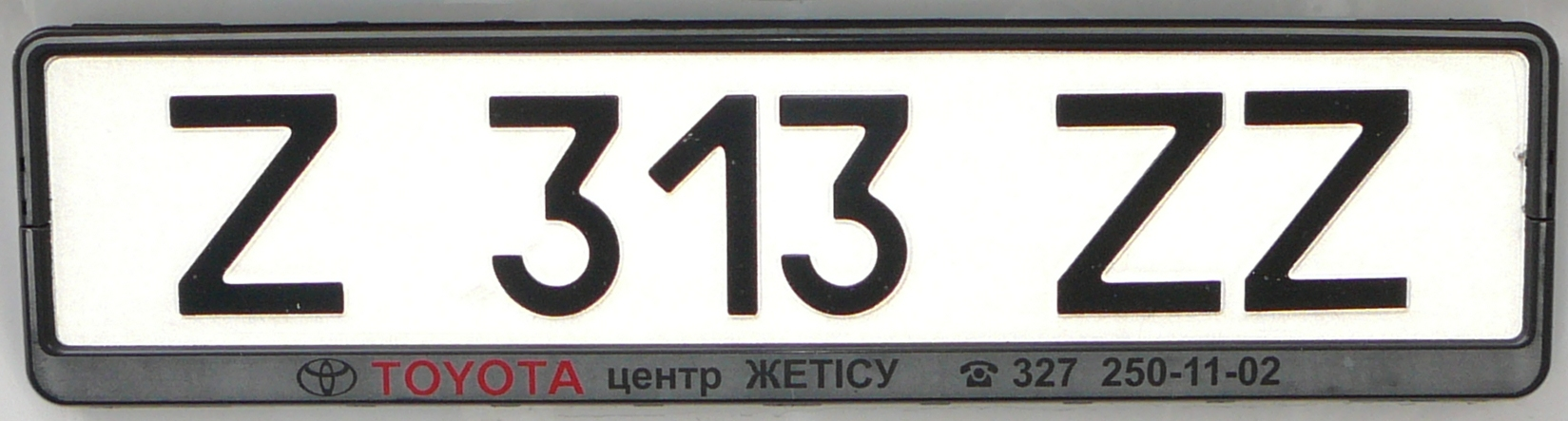 Казахстанский автомобильный номер выданный на юридическое лицо. Номер "Z313ZZ". Буква "Z" - перед цифрами обозначает "город Астана" Серия ZZ - до 2005-го года выдавалась служебным автомобилям МВД РК.